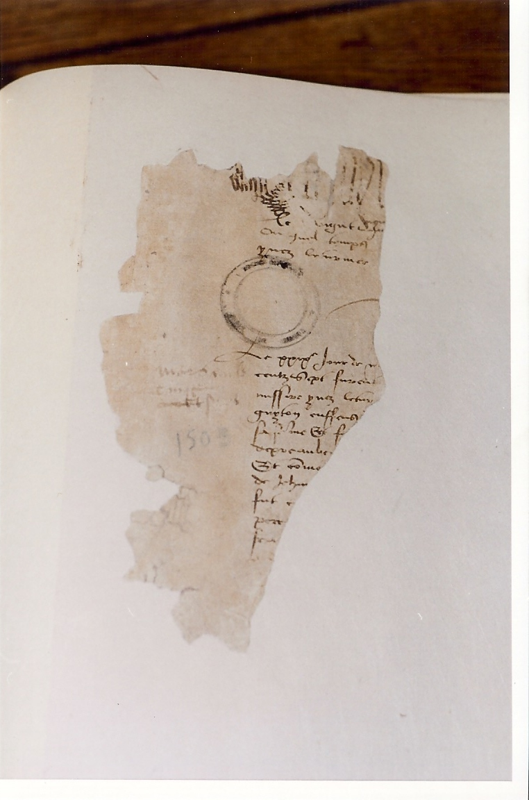 Batz-sur-Mer Registre d'état civil